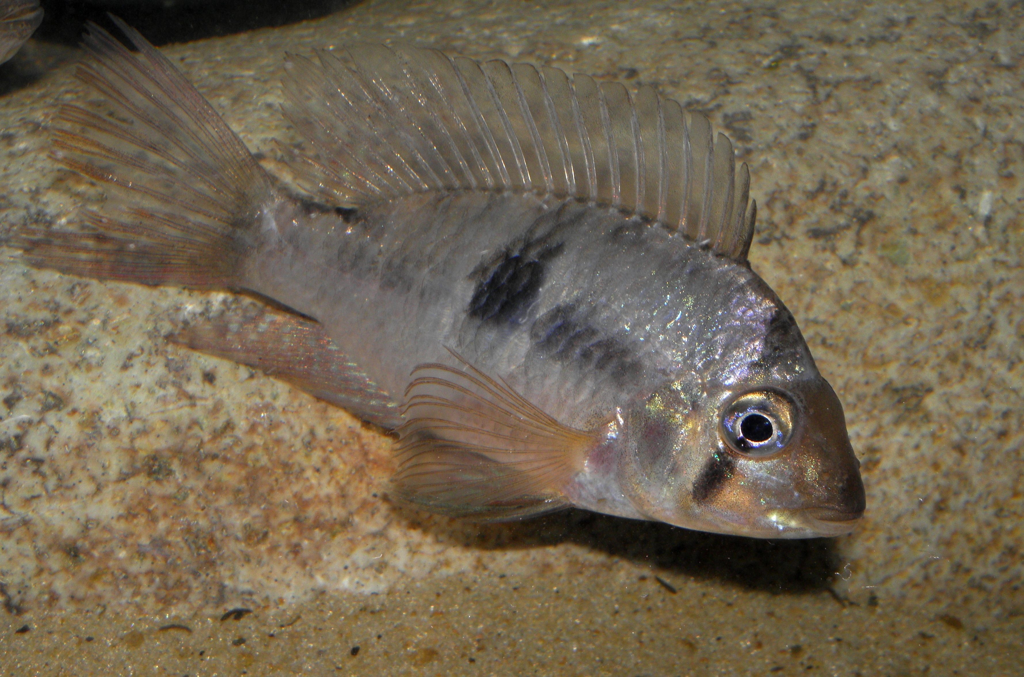 Gymnogeophagus meridionalis.